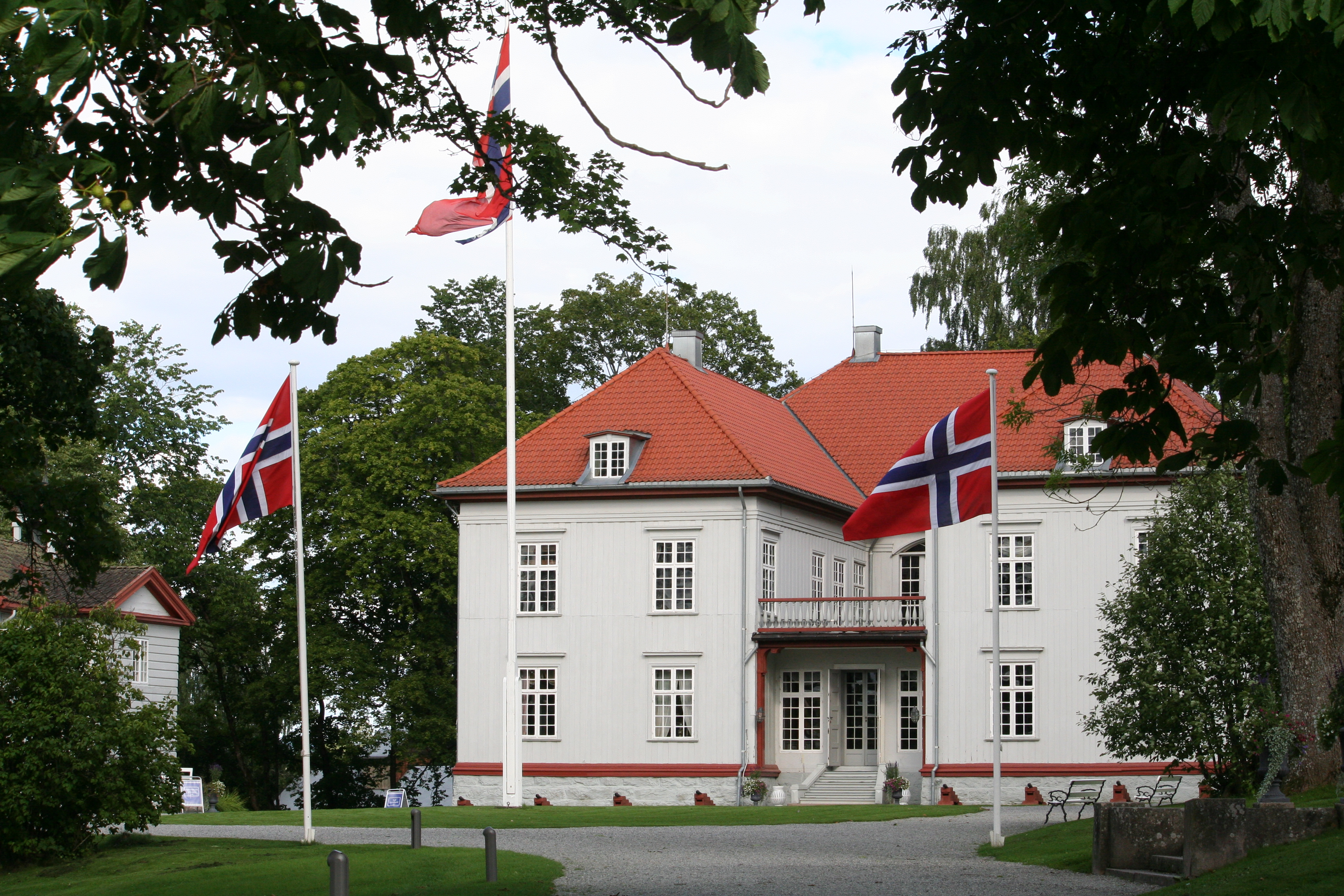 Foto: Kjersti Almåsvold